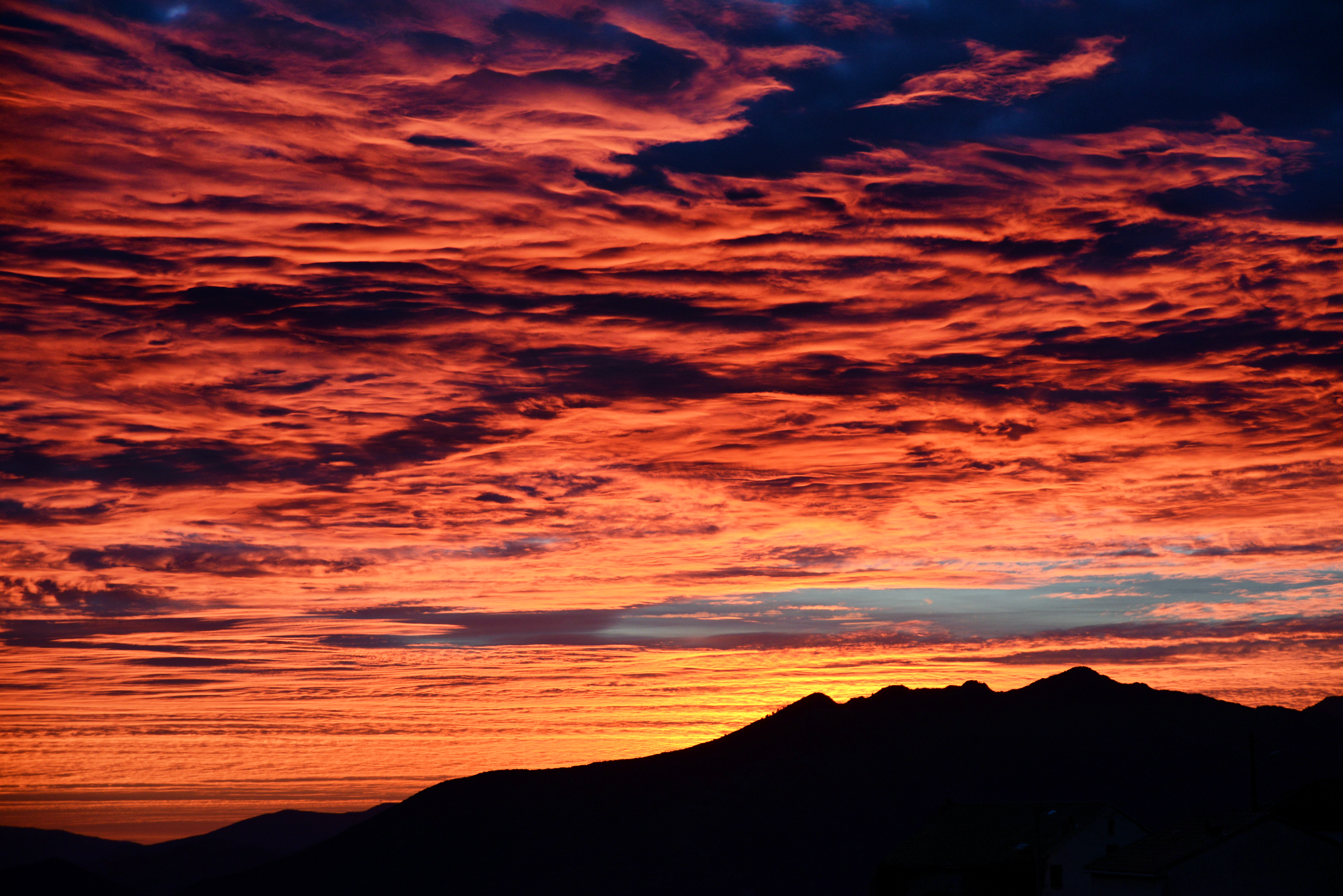 Venaco im Zentrum Korsikas - Sonnenaufgang über die Bergen von Noceta und den Tavignano-Tal.